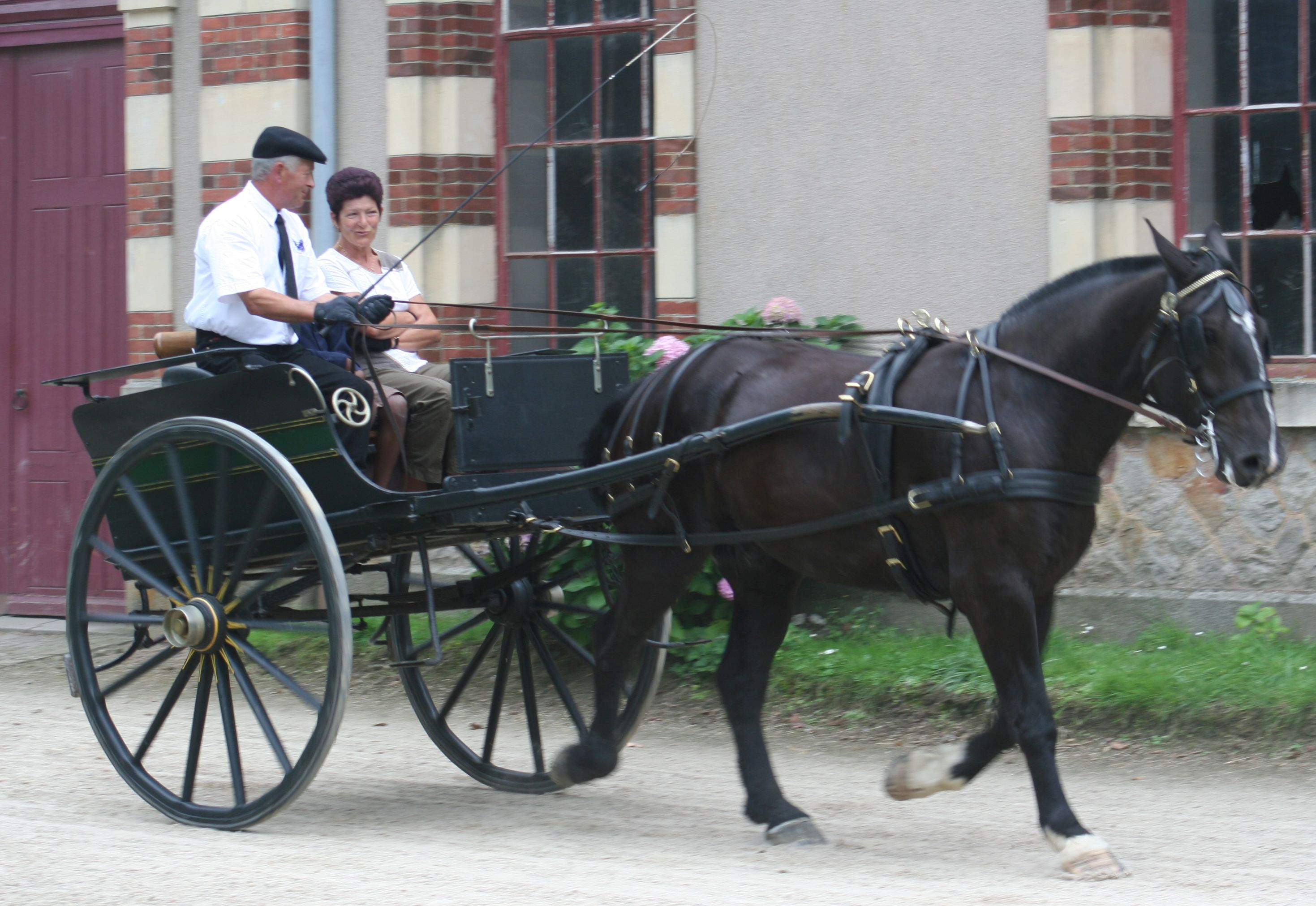 Attelage Cob Normand présenté au haras de St-Lô, France